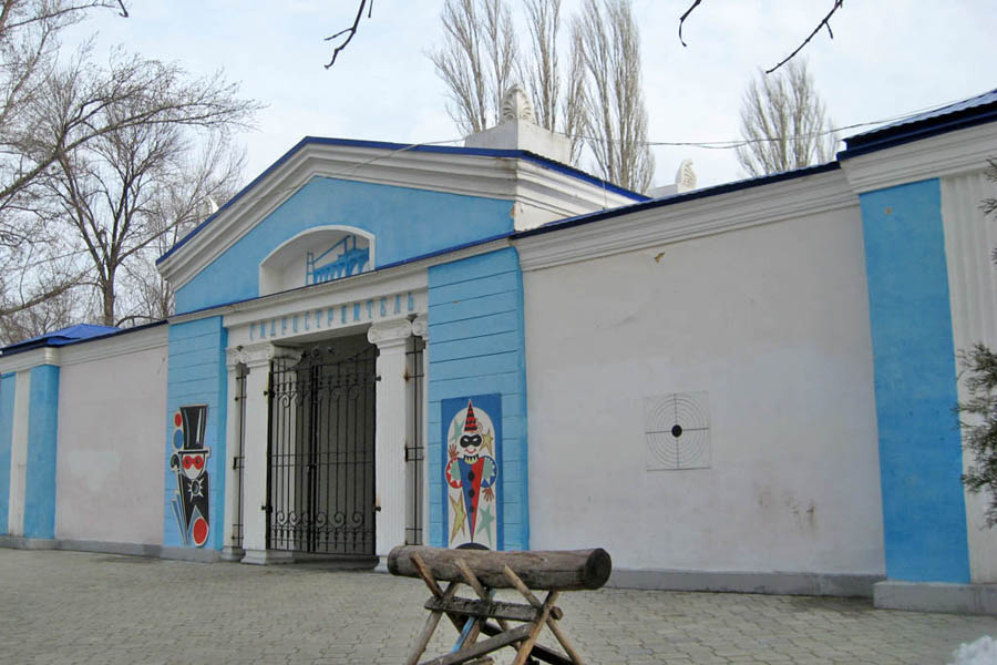 Павильон «Гидростроитель» (бывший летний театр) в центральном парке культуры и отдыха Волжского